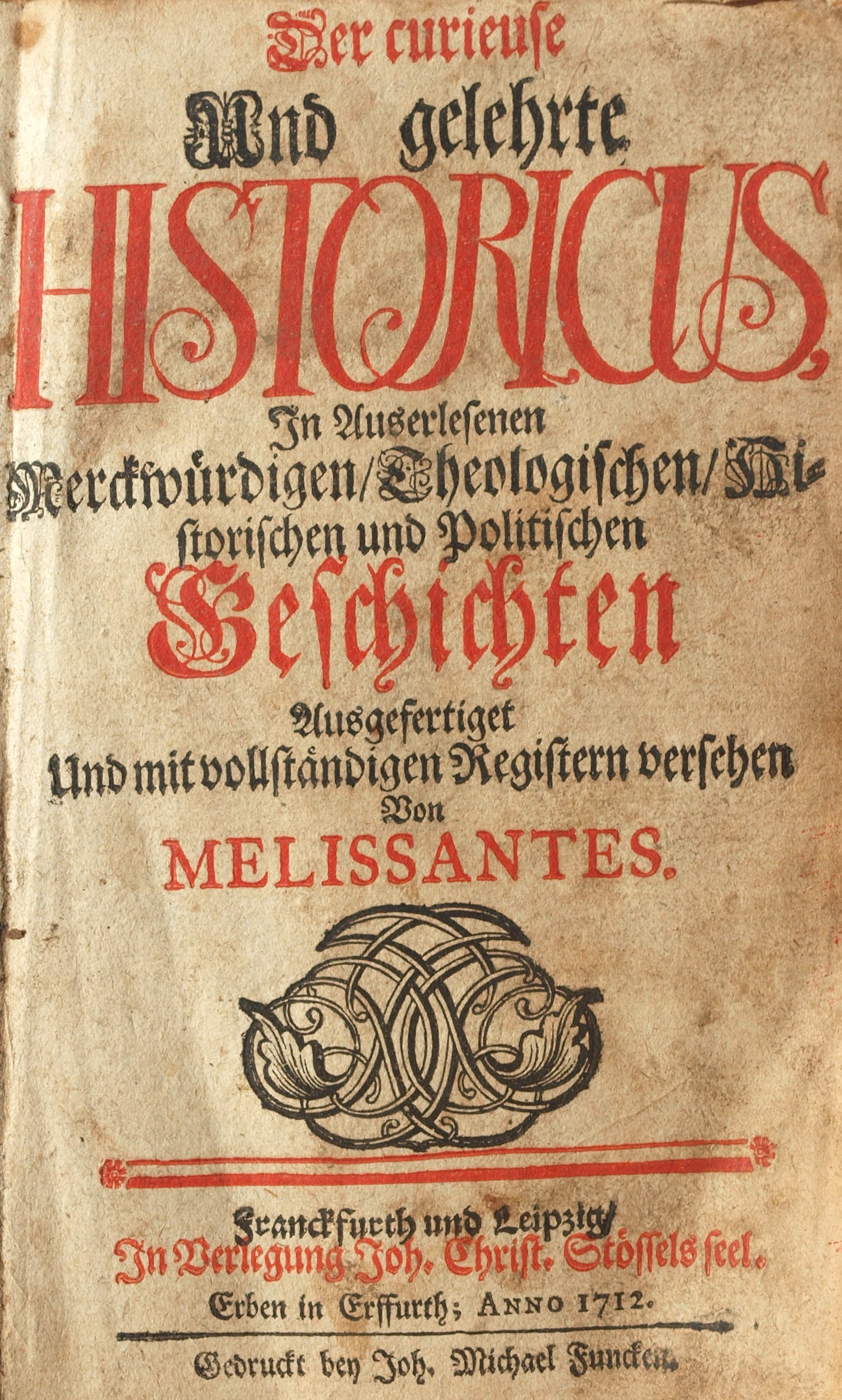 FrontPage HISTORICUS